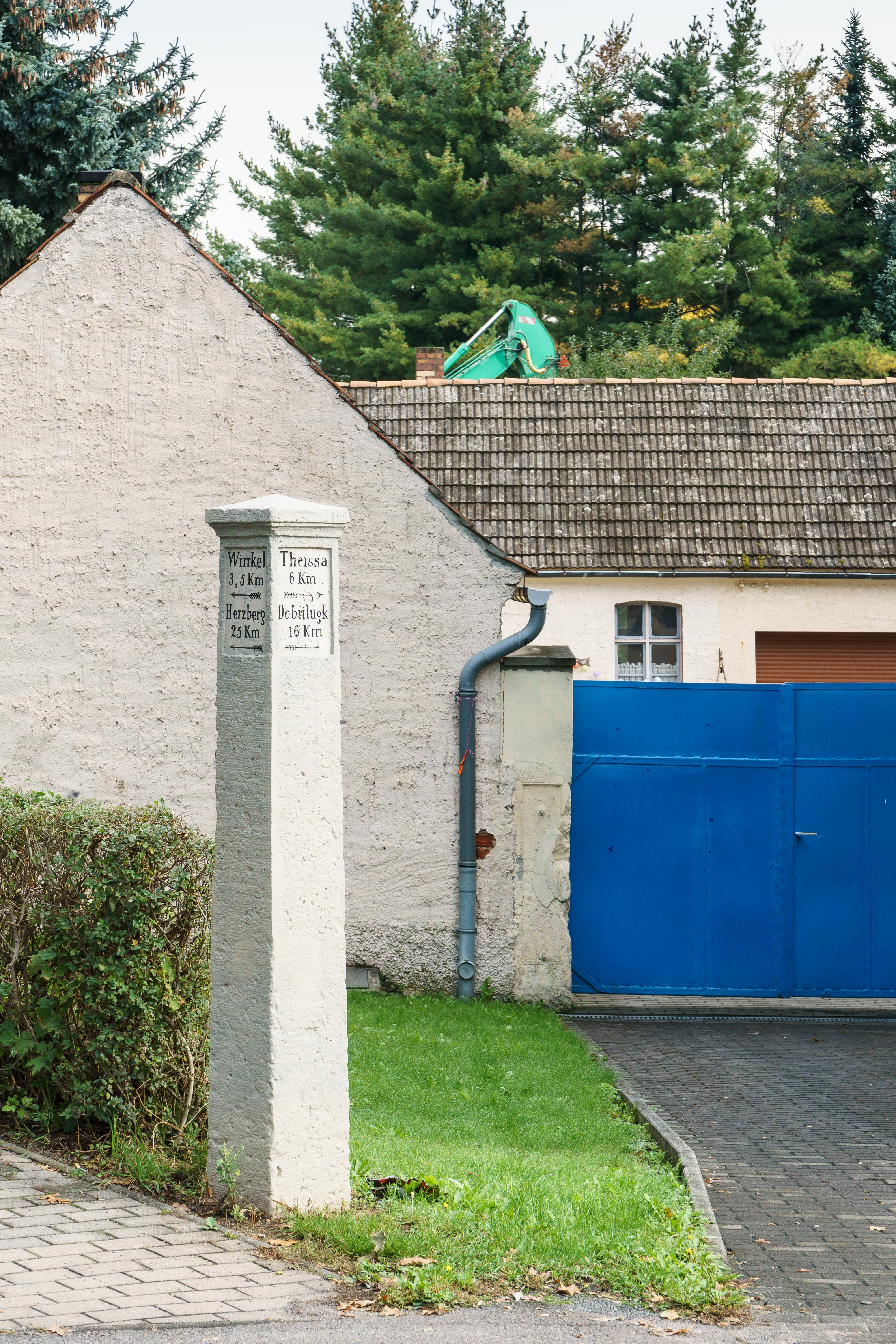 Wegweiser Berliner Straße 8 in Bad Liebenwerda. Text: Winkel 3,5 Km ; Herzberg 25 Km ; Theissa 6 Km ; Doberlugk 16 Km ; Richtungsweiser